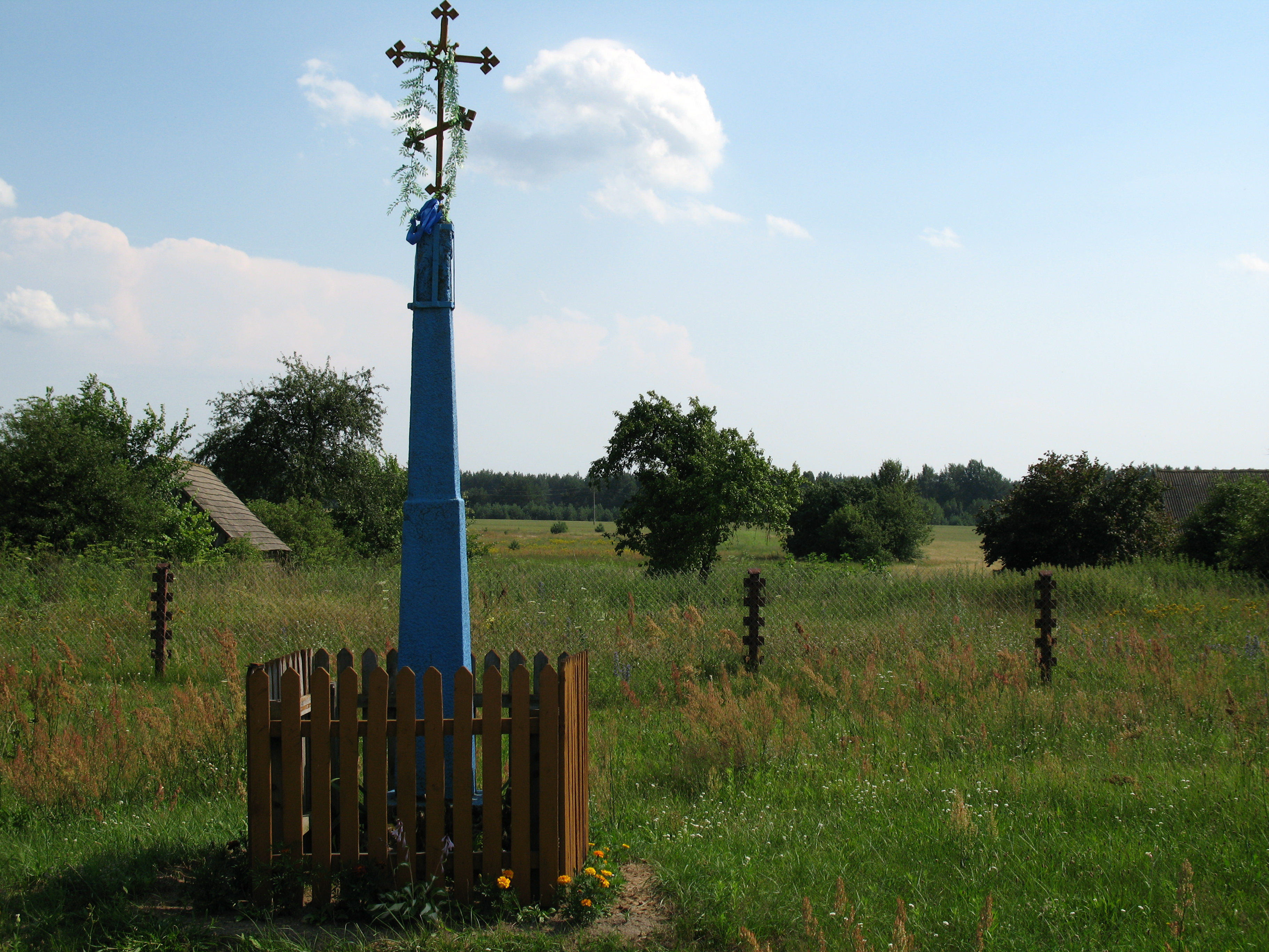 Krzyż wotywny we wsi Saki koło Trześciank